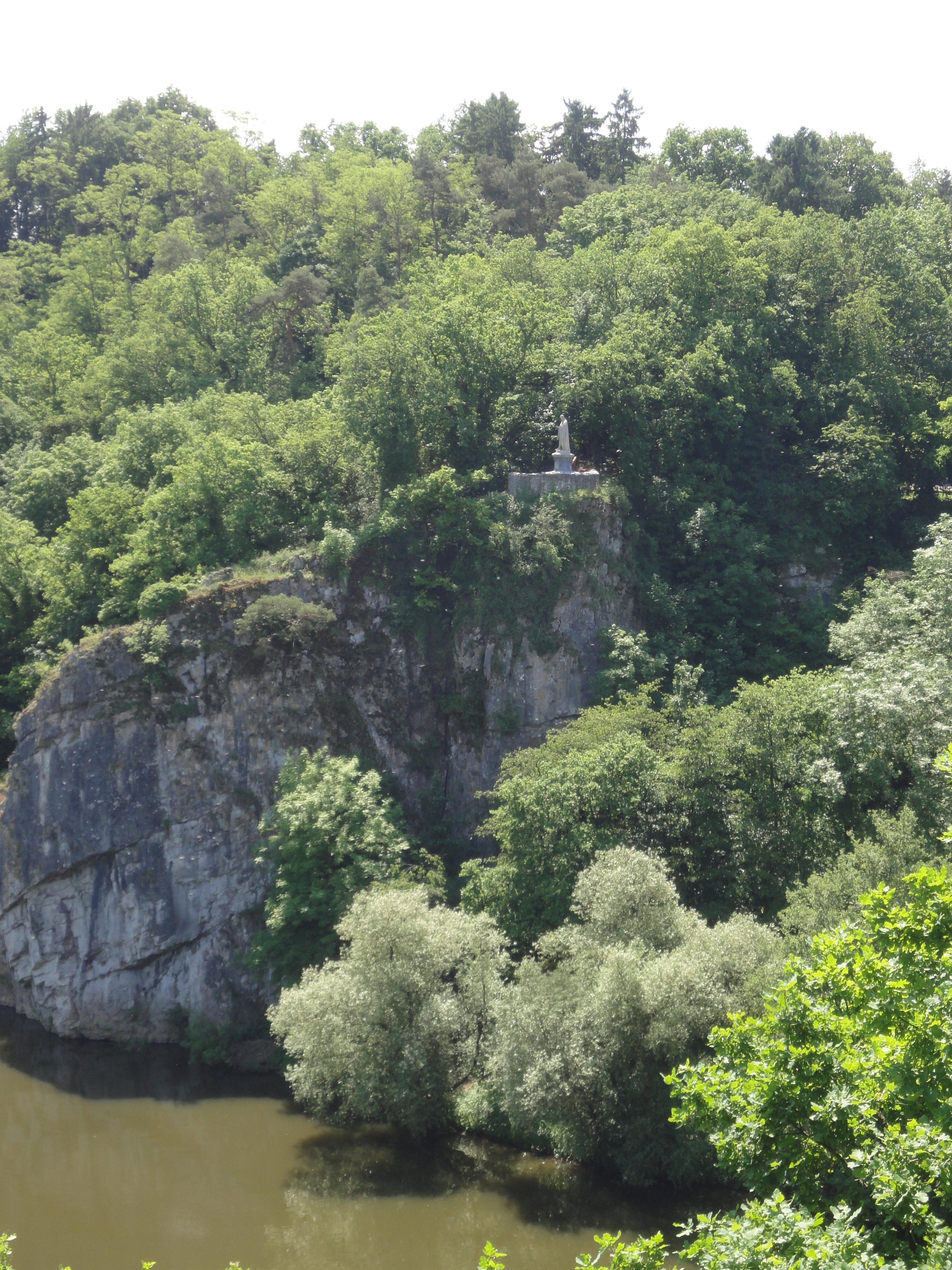 Das König Konrad-Denkmal bei Villmar an der Lahn, auf dem Felsen Bodenstein